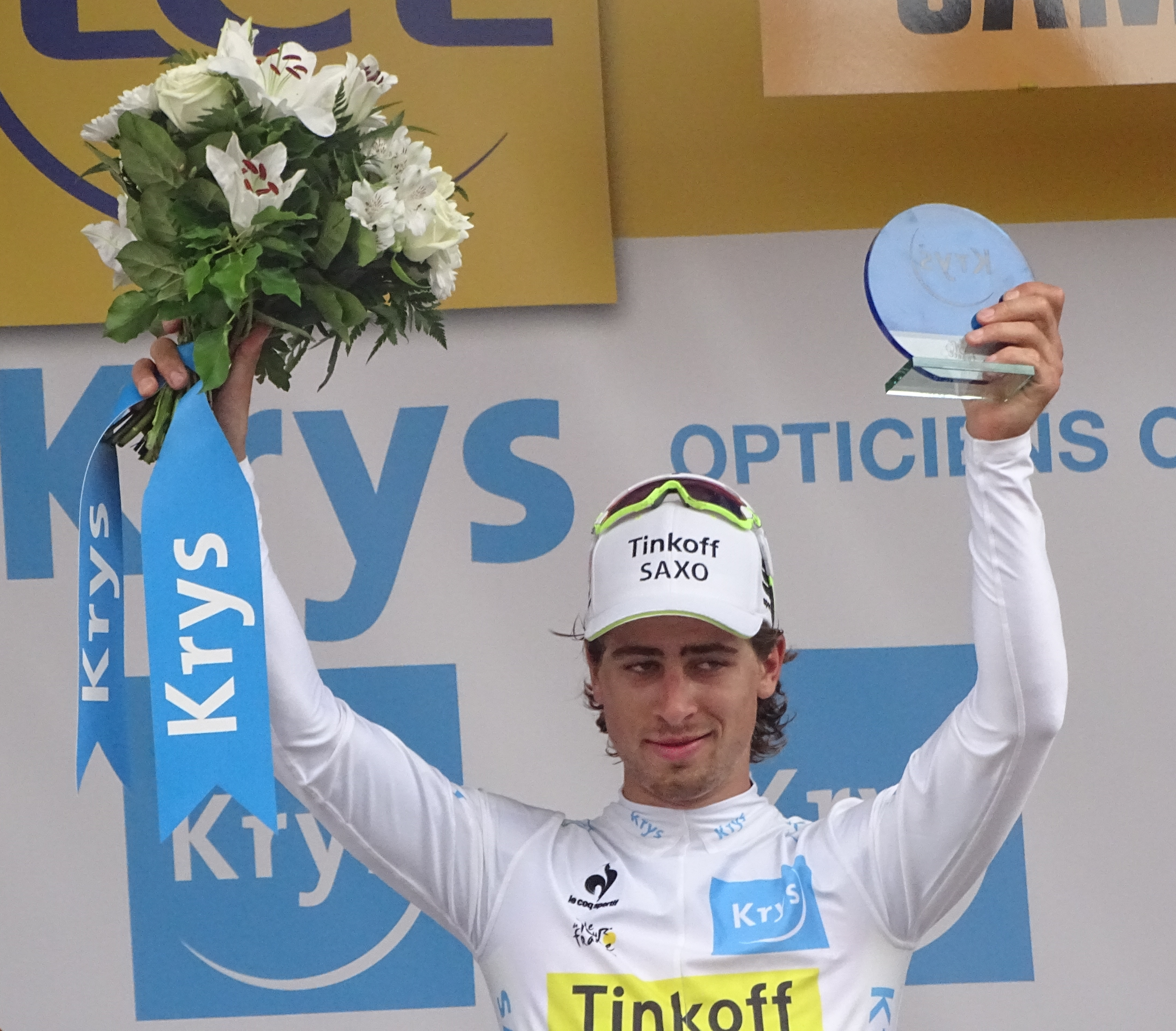 Reportage réalisé le mardi 7 juillet à l'occasion de l'arrivée de la quatrième étape du Tour de France 2015 à Cambrai, Nord-Pas-de-Calais, France.